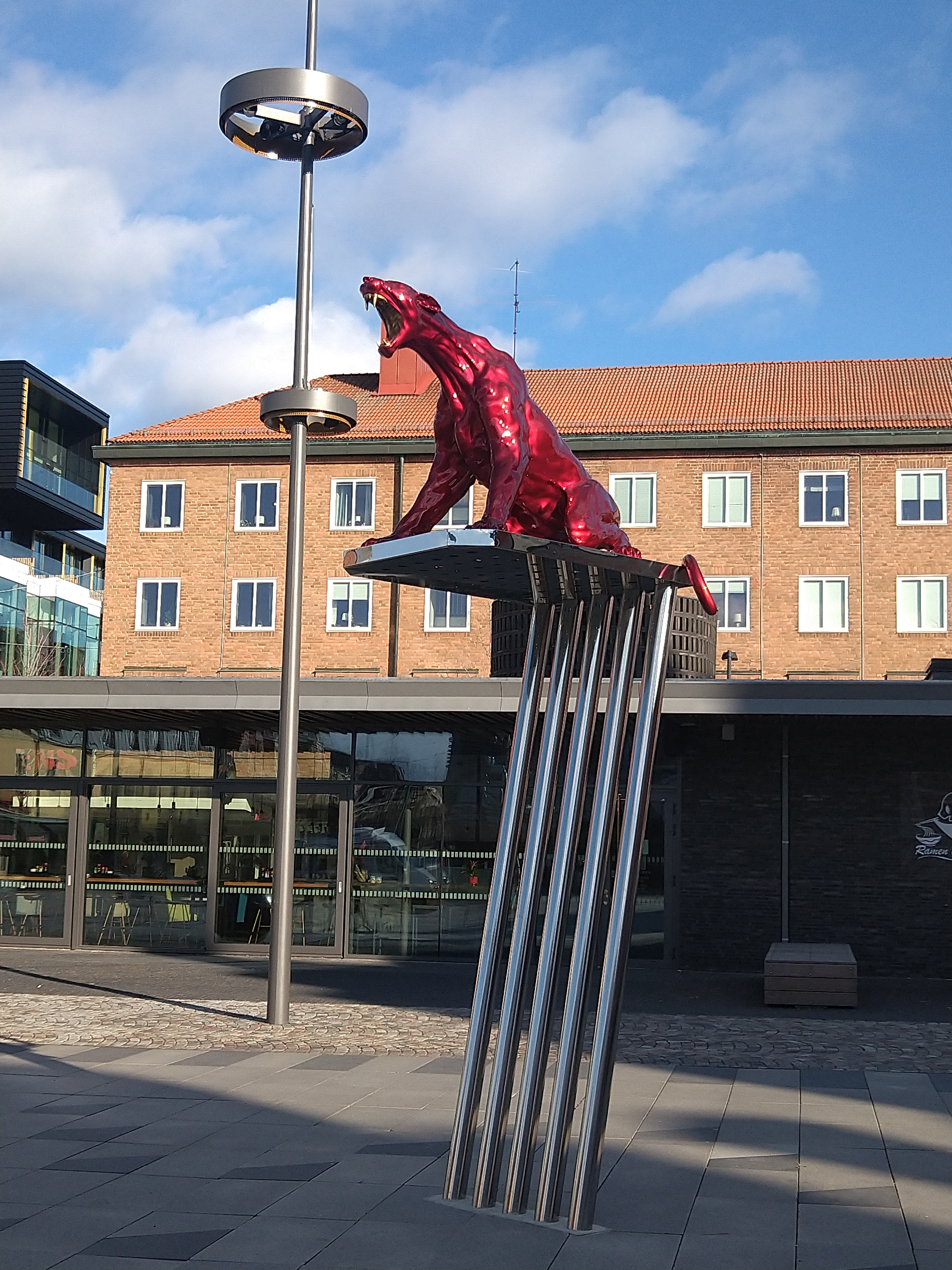 Skulpturen "Listen" av Camilla Akraka. Skulpturen föreställer en röd puma som ryter, och som symboliserar metoo-rörelsen.